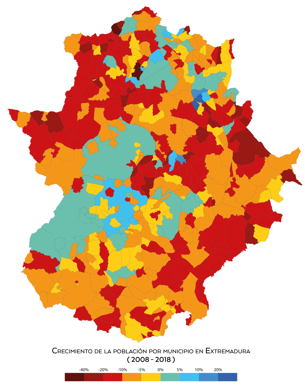 Crecimiento de la población por municipio en Extremadura entre los años 2008 y 2018